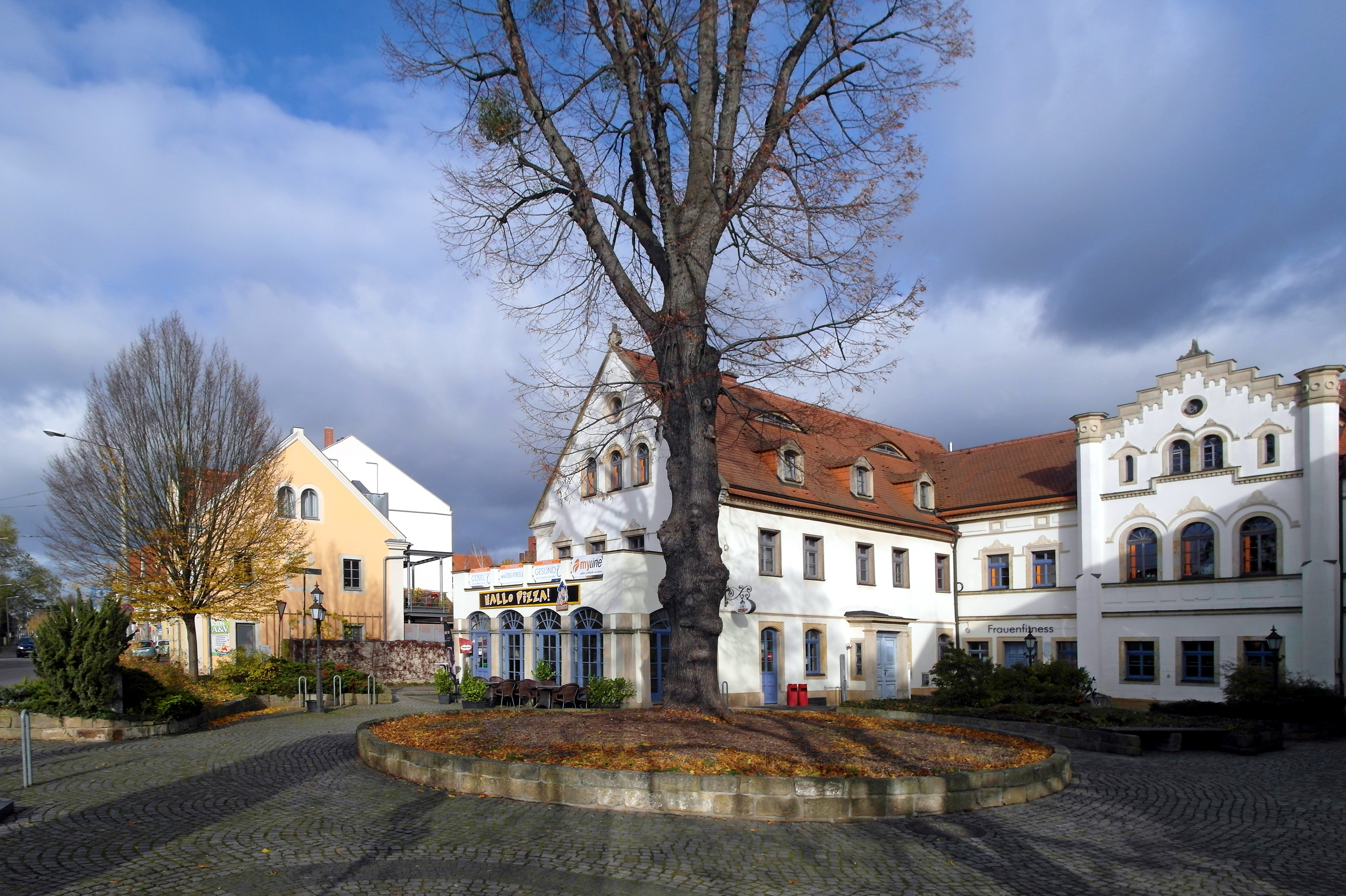 19.11.2017 01279 Dresden-Laubegast: Herrenhaus Österreicher Straße 39 (GMP: 51.025470,13.837674), hinten links Nr. 37. [SAM2723+2726.JPG]20171119260MDR.JPG(c)Blobelt